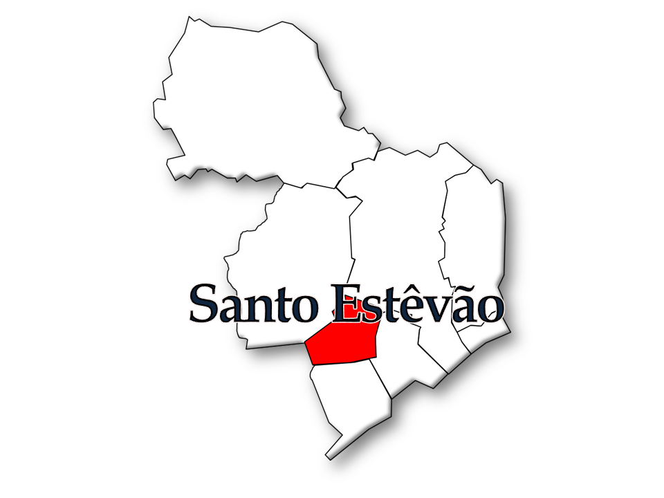 Censos 1864/2011